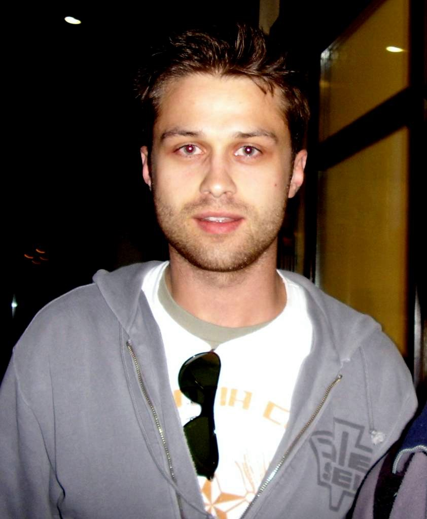 Maciej Gracjan Zakościelny (ur. 7 maja 1980 w Stalowej Woli) – polski aktor filmowy.